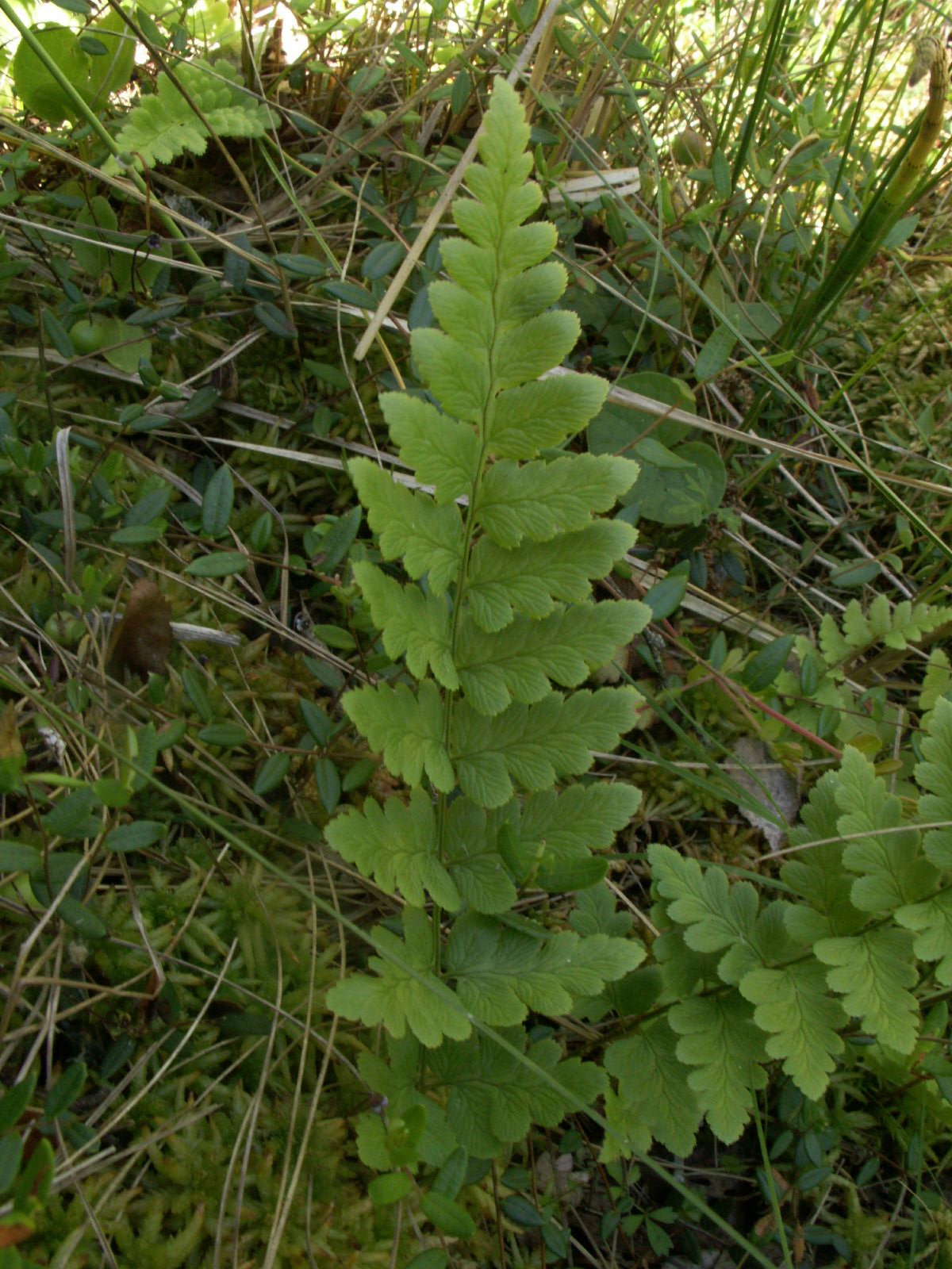 Dryopteris cristata in einem Niedermoor in Litauen